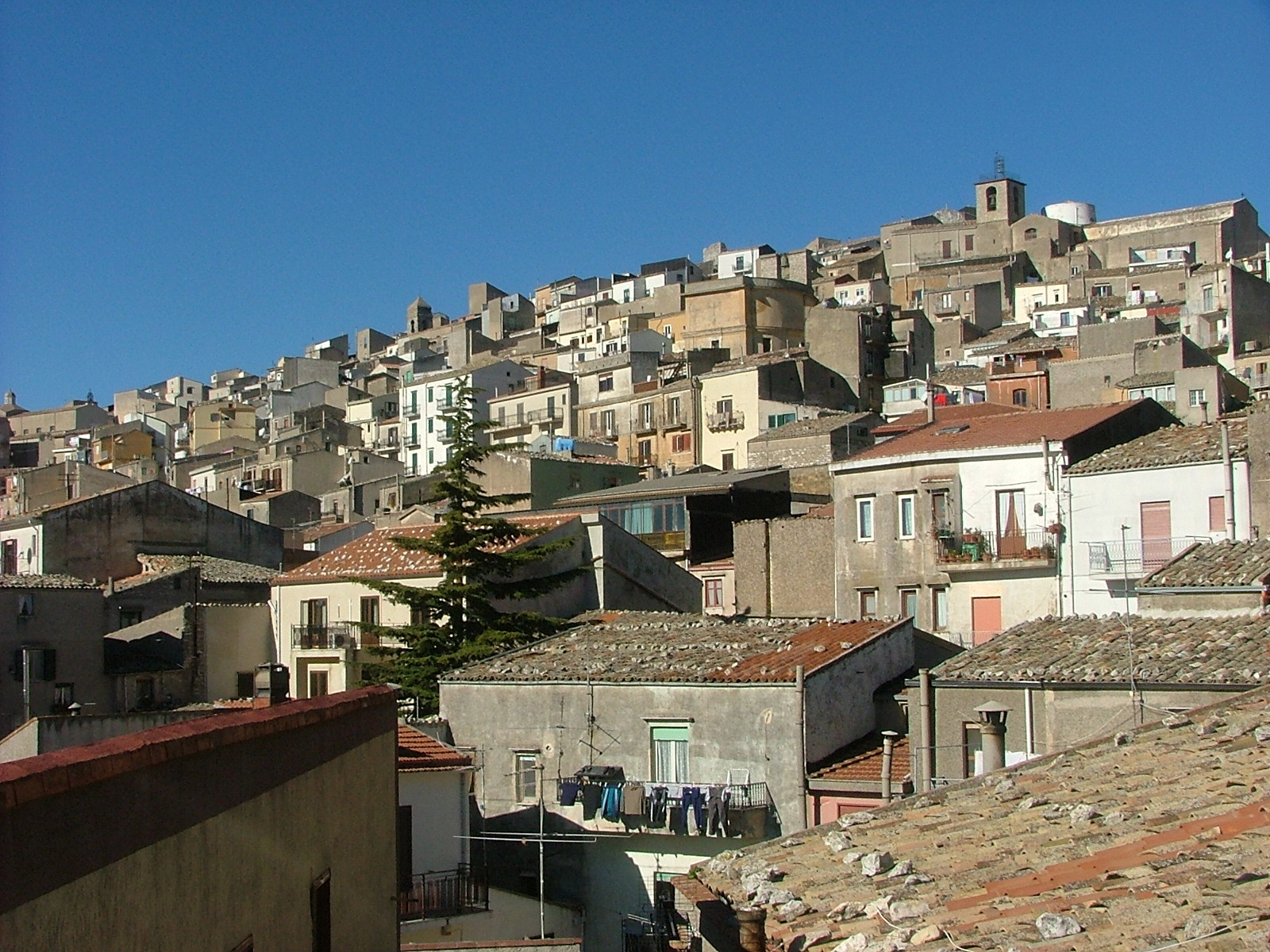 Il Paese di Prizzi in provincia di Palermo